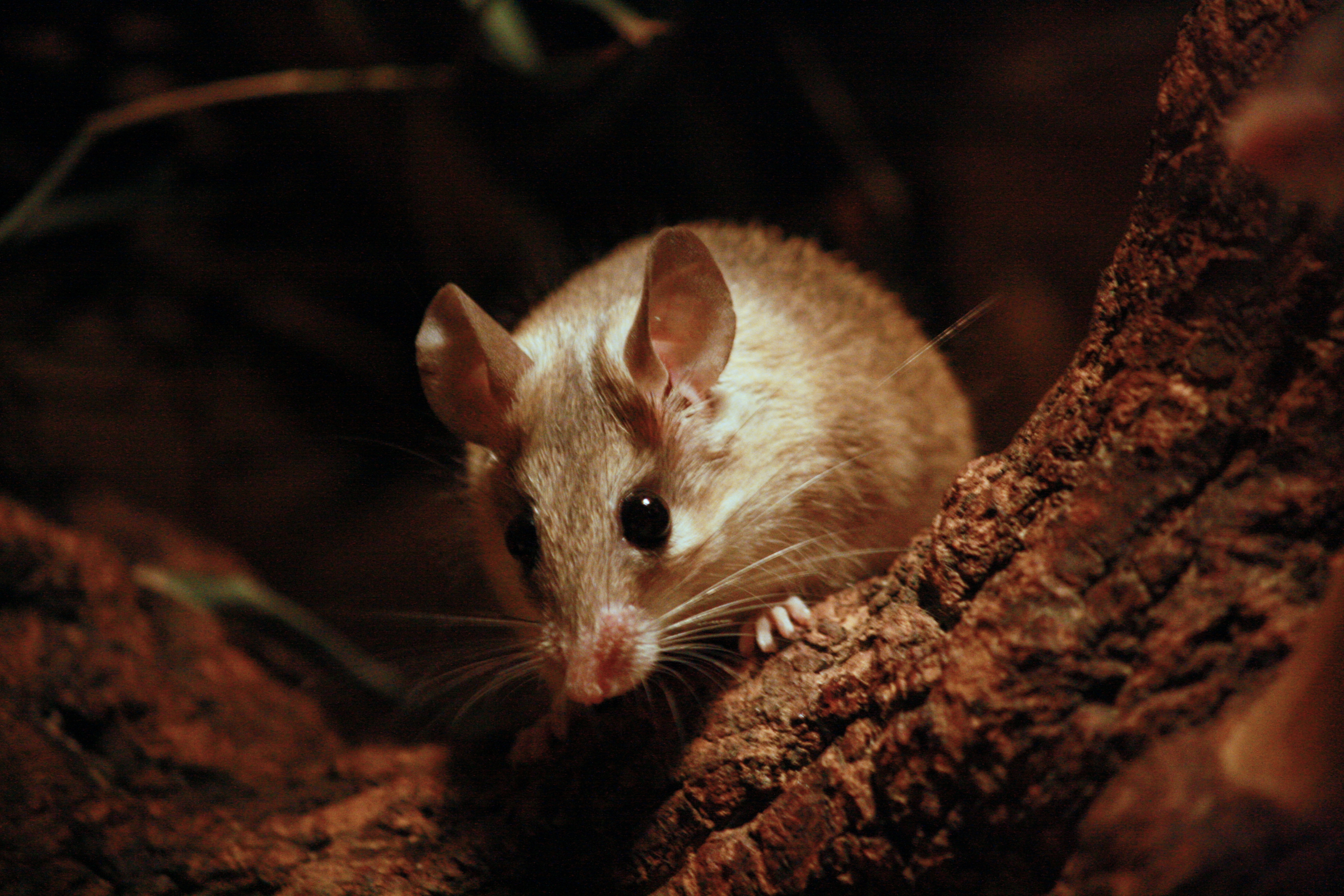 Zoo Praha